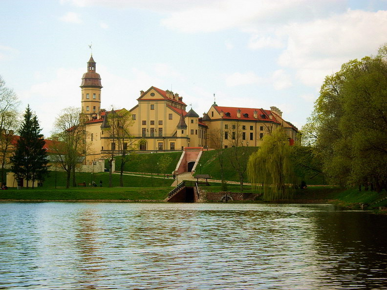 Нясвіж і Нясвіжскі замак